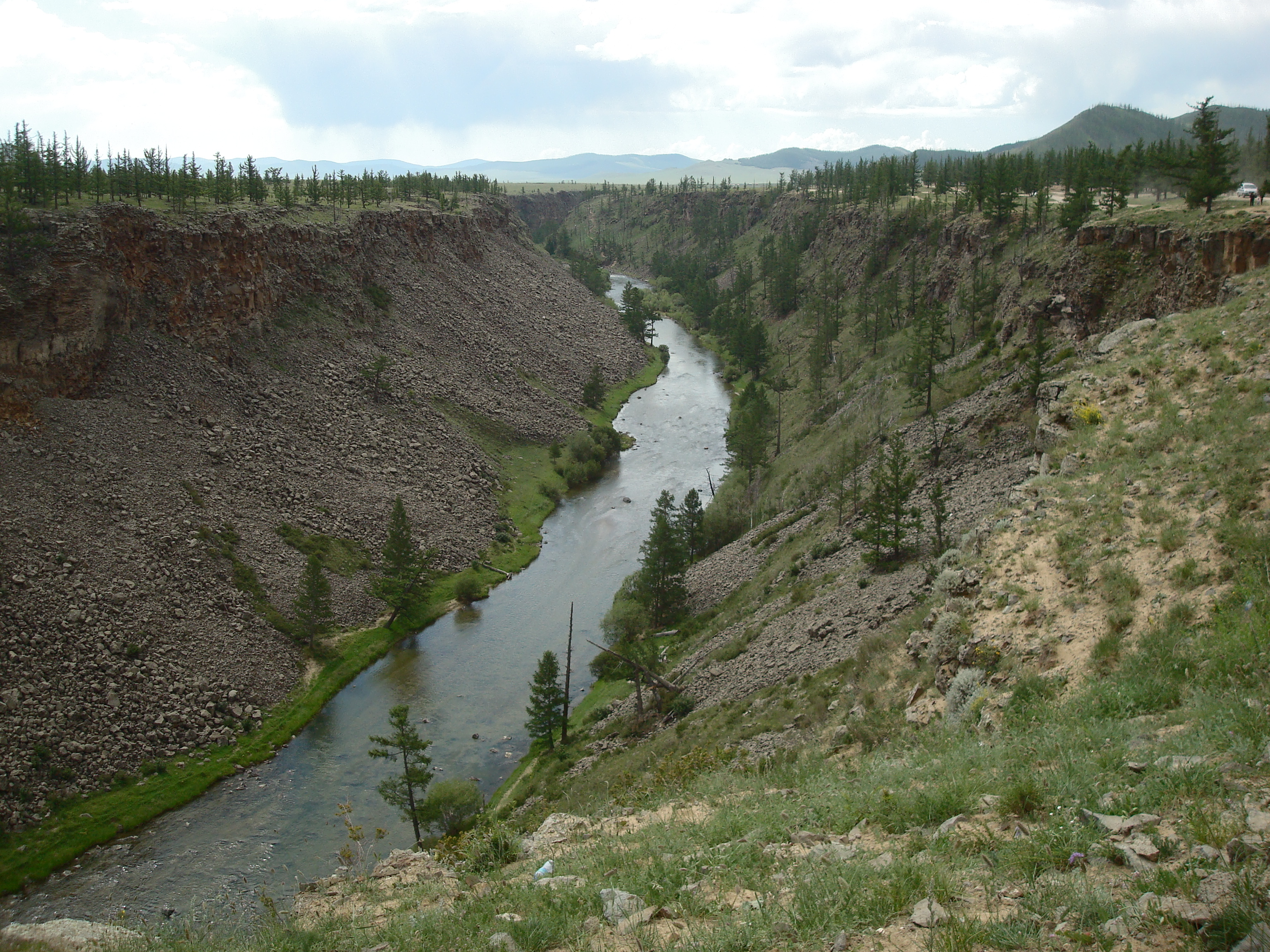 Am Tschuluut